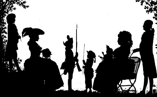 Familie Schlözer 1784: Prof. A. L. Schlözer mit seinen fünf Kindern, Tochter Dorothea mit Globus Silhouette auf Glas, aus: Himme, Hans-Heinrich (Hrsg.): Stich-haltige Beiträge zur Geschichte der Georgia Augusta in Göttingen: 220 Stiche aus den ersten 150 der Göttinger Universität, zusammengetragen und mit Texten versehen anläßlich ihres 250-jährigen Jubiläums, Göttingen 1987